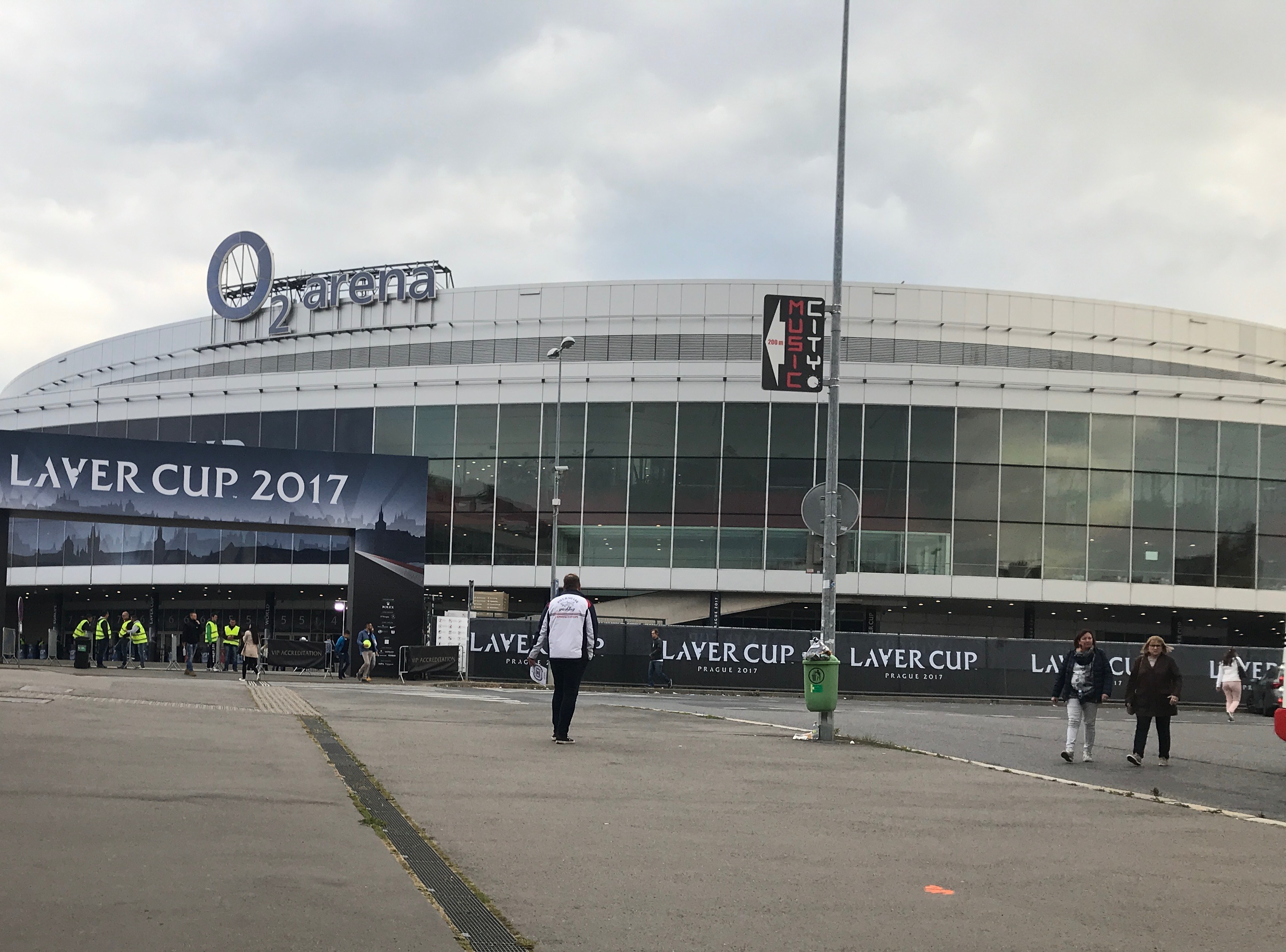 Vstup, O2 Aréna Praha, Laverův pohár (Laver Cup)